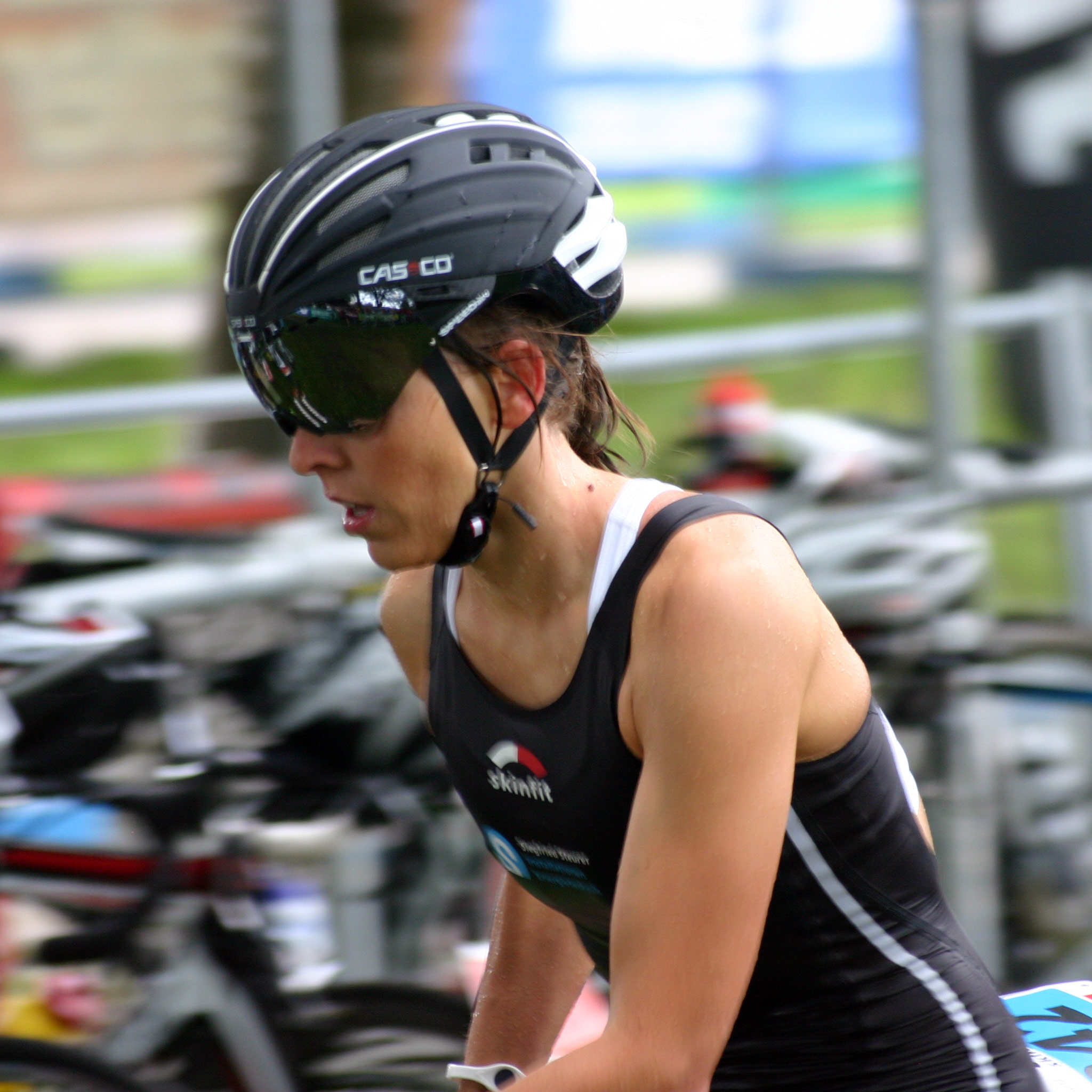 Bianca Steurer beim Jannersee Triathlon 2014